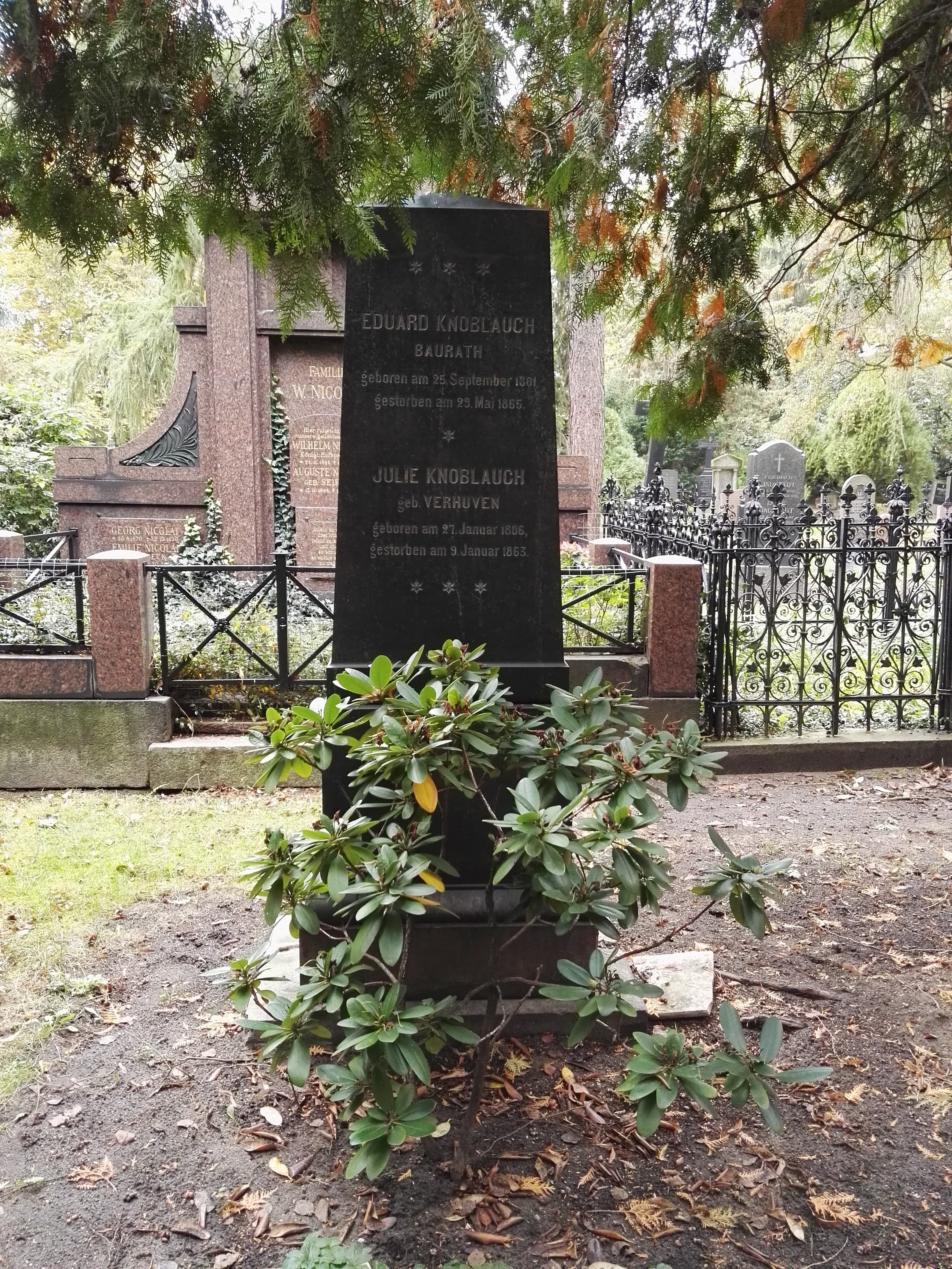 Grab von Eduard Knoblauch auf dem St.-Marien- und St.-Nicolai-Friedhof Pankow. Ehrengrab